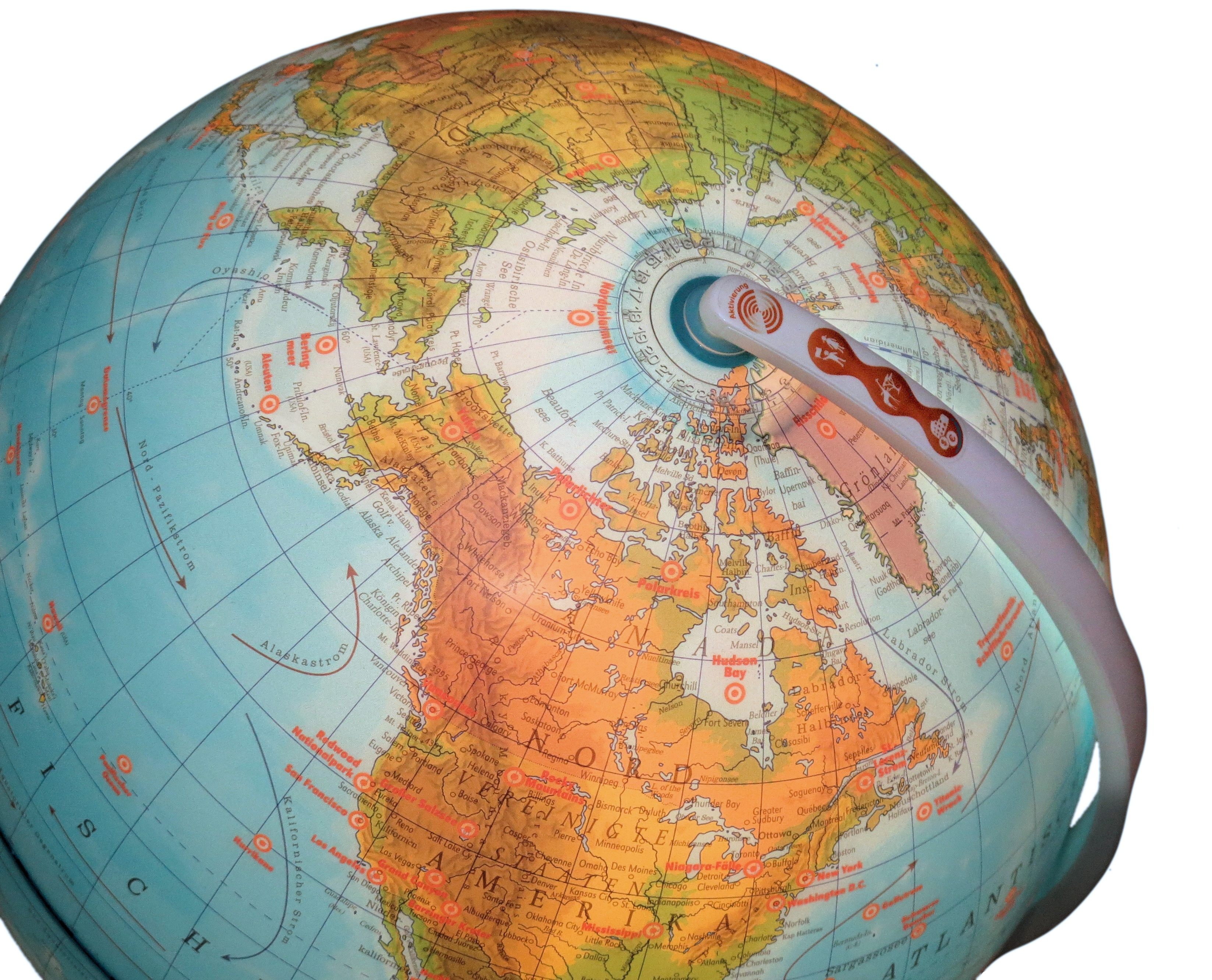 TING Hörstift Globus